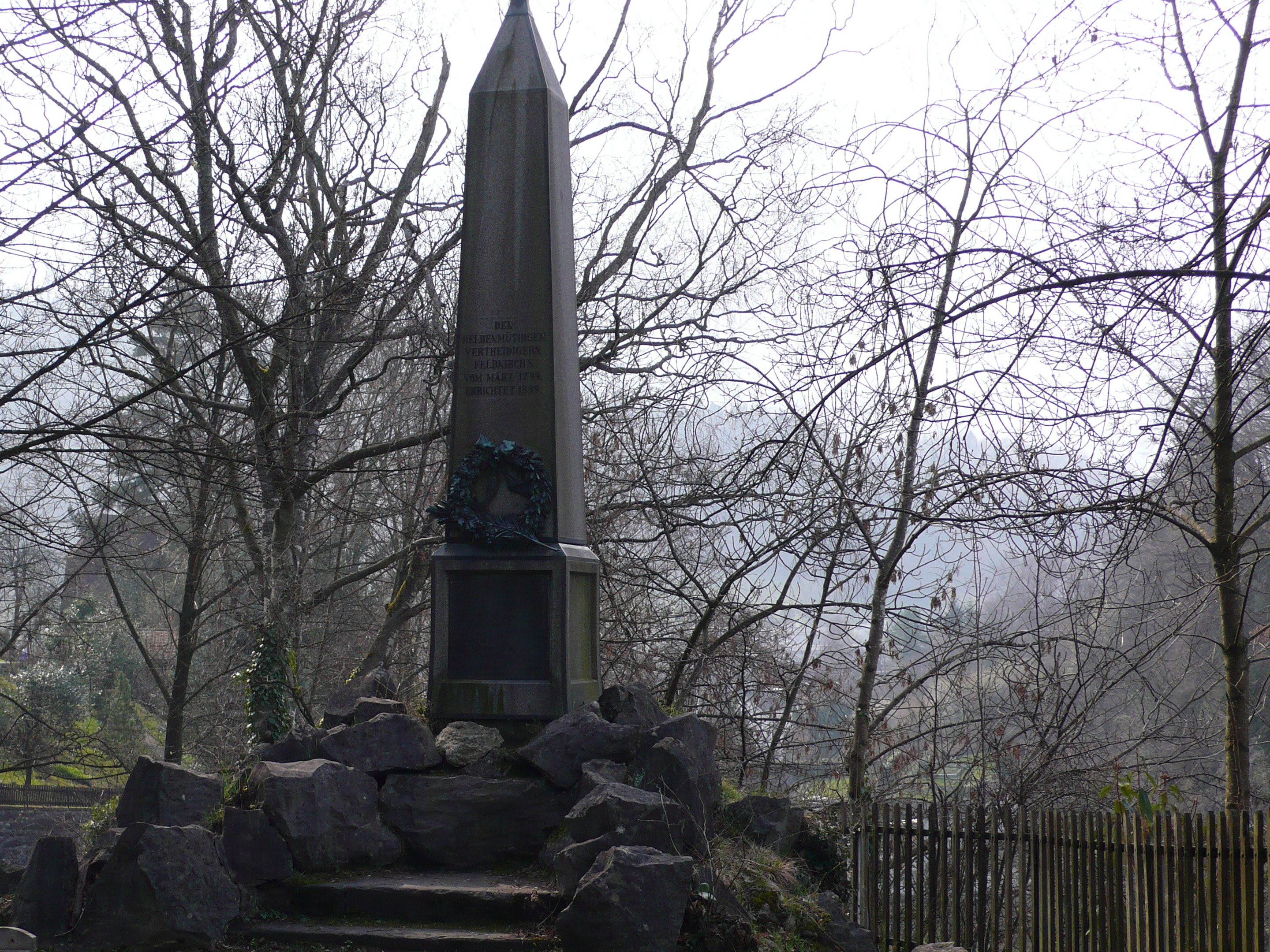 Denkmal auf dem Veitskapf (Schlacht 1799, Feldkirch-Tosters)